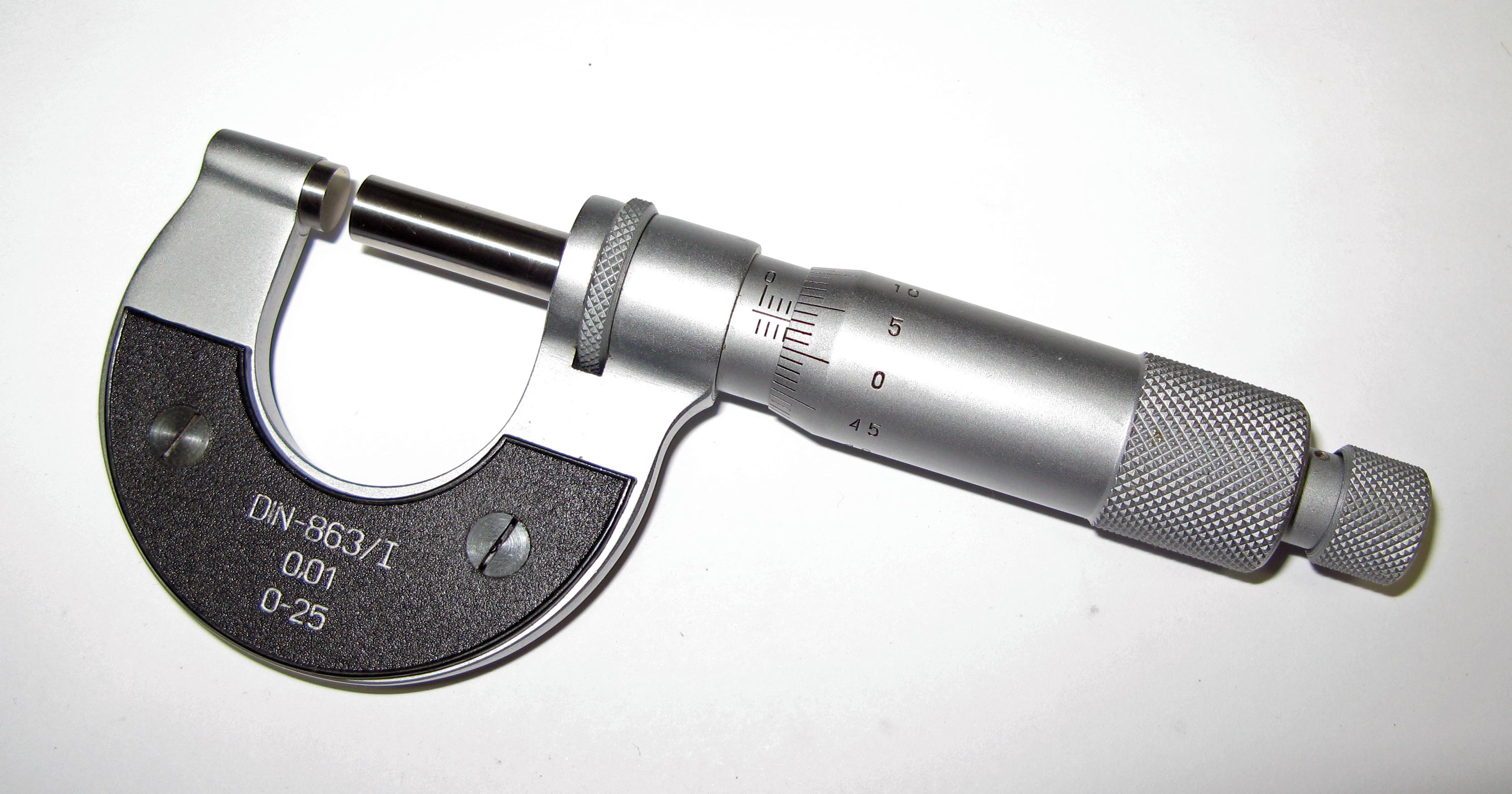 Mikrometerschrauf.